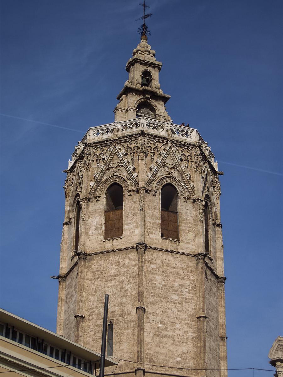 CATEDRAL DE VALENCIA 08122007 121909 00035.jpg